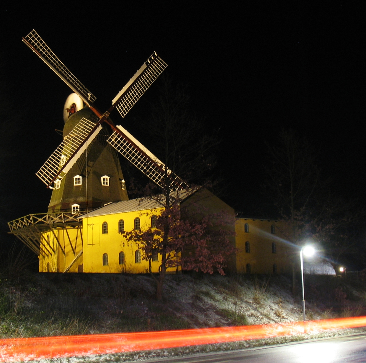 Hersholm mølle, Ved Møllen 8, Hørsholm, Sj. Eget foto, Noorse Licentie: CC-BY-SA-3.0 Forminsket versjon for Wikipedia